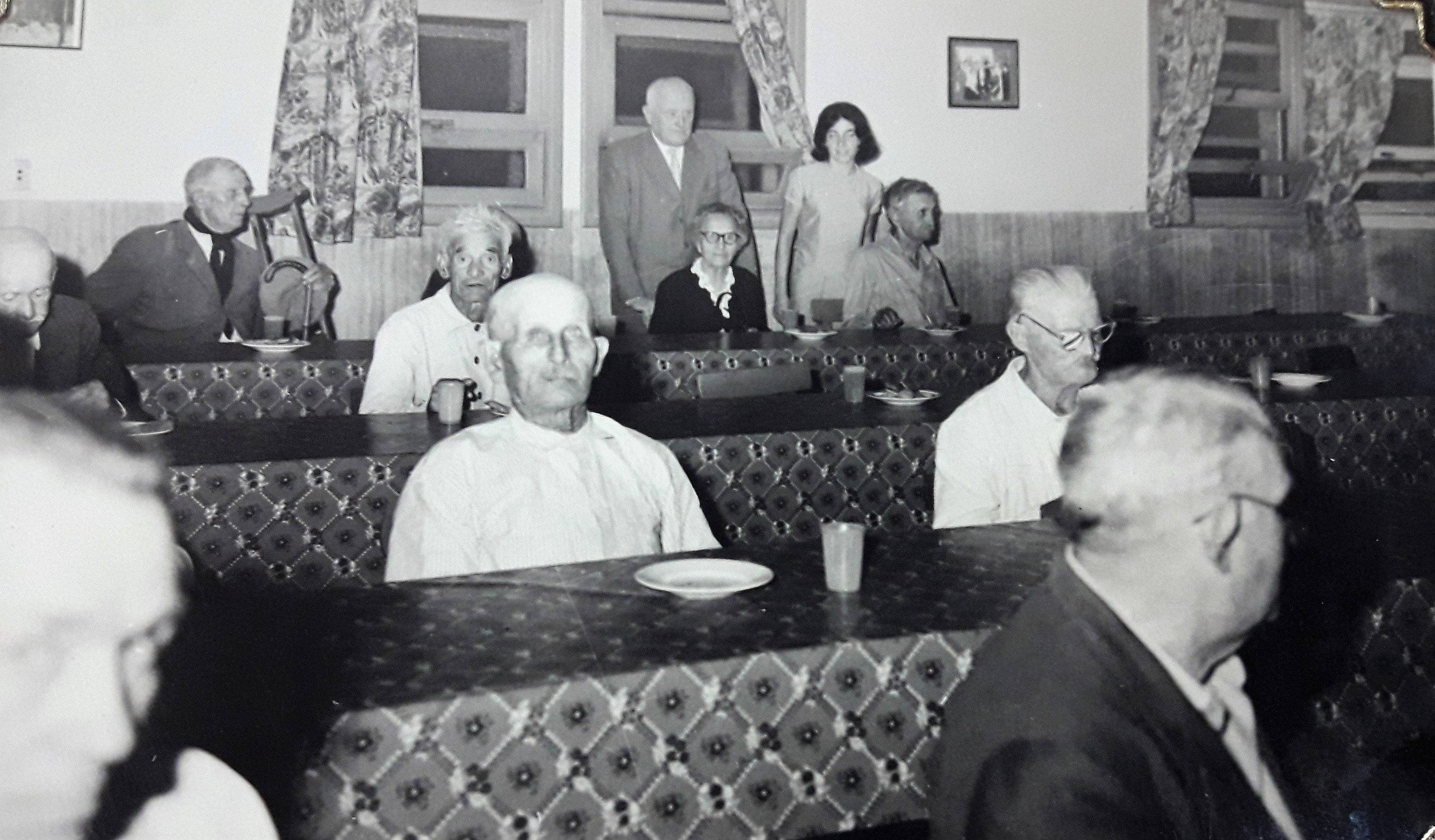 Magdalena Grotter compartiendo con concurrentes del Hogar de Ancianos